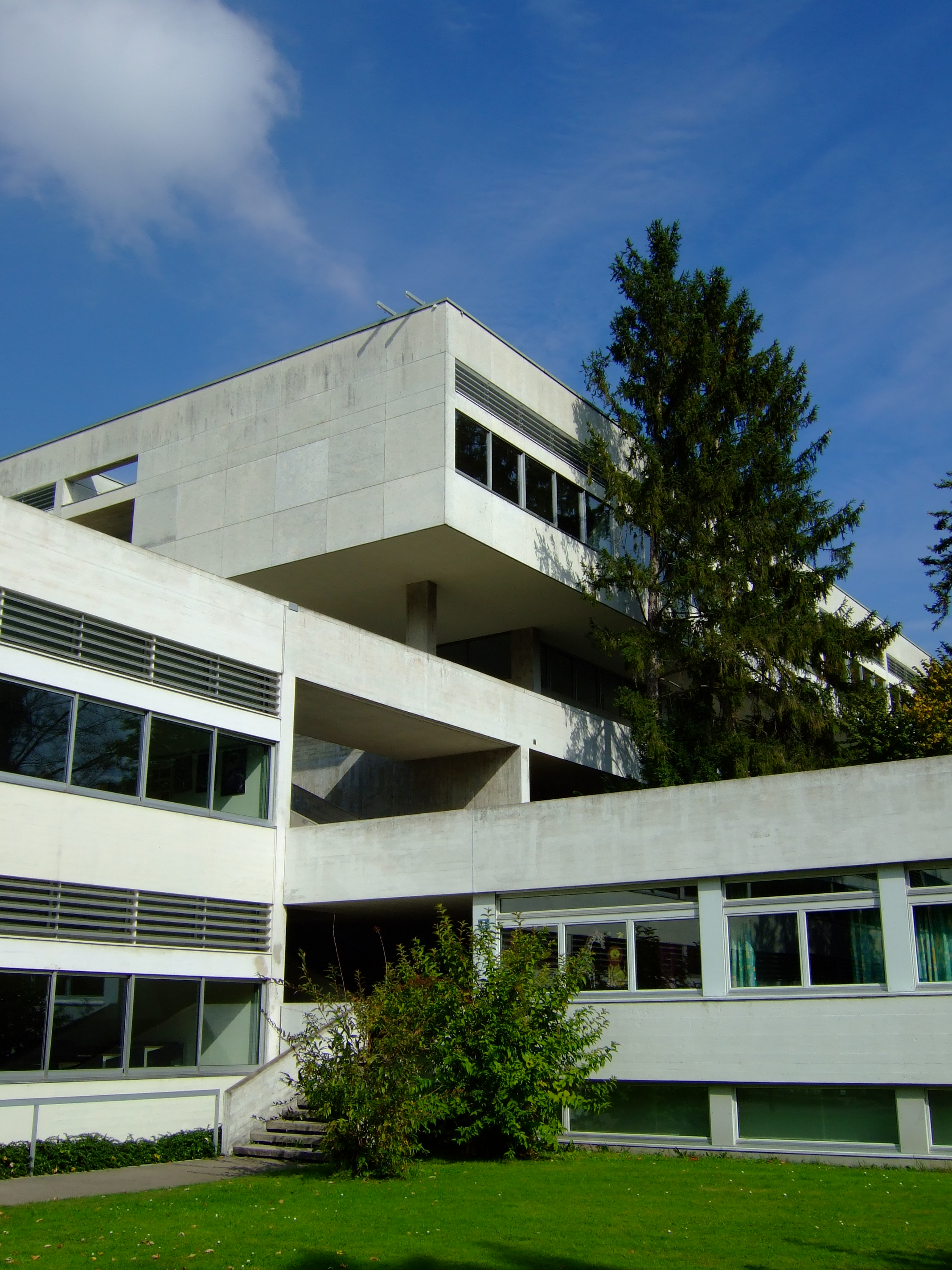 Die Kantonsschule Freudenberg in Zürich 2008